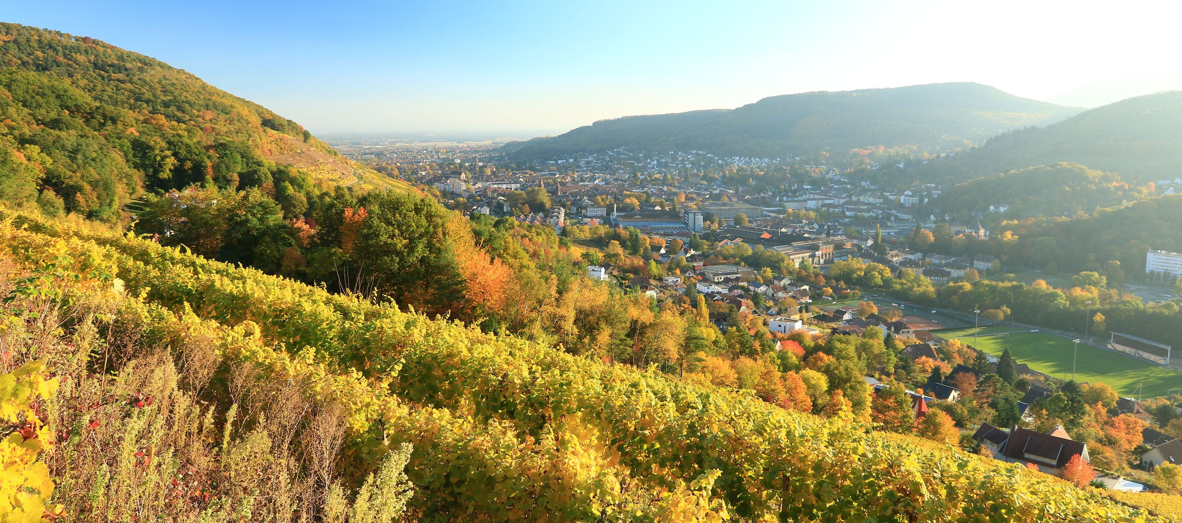 Vue de Guebwiller depuis le vignoble.